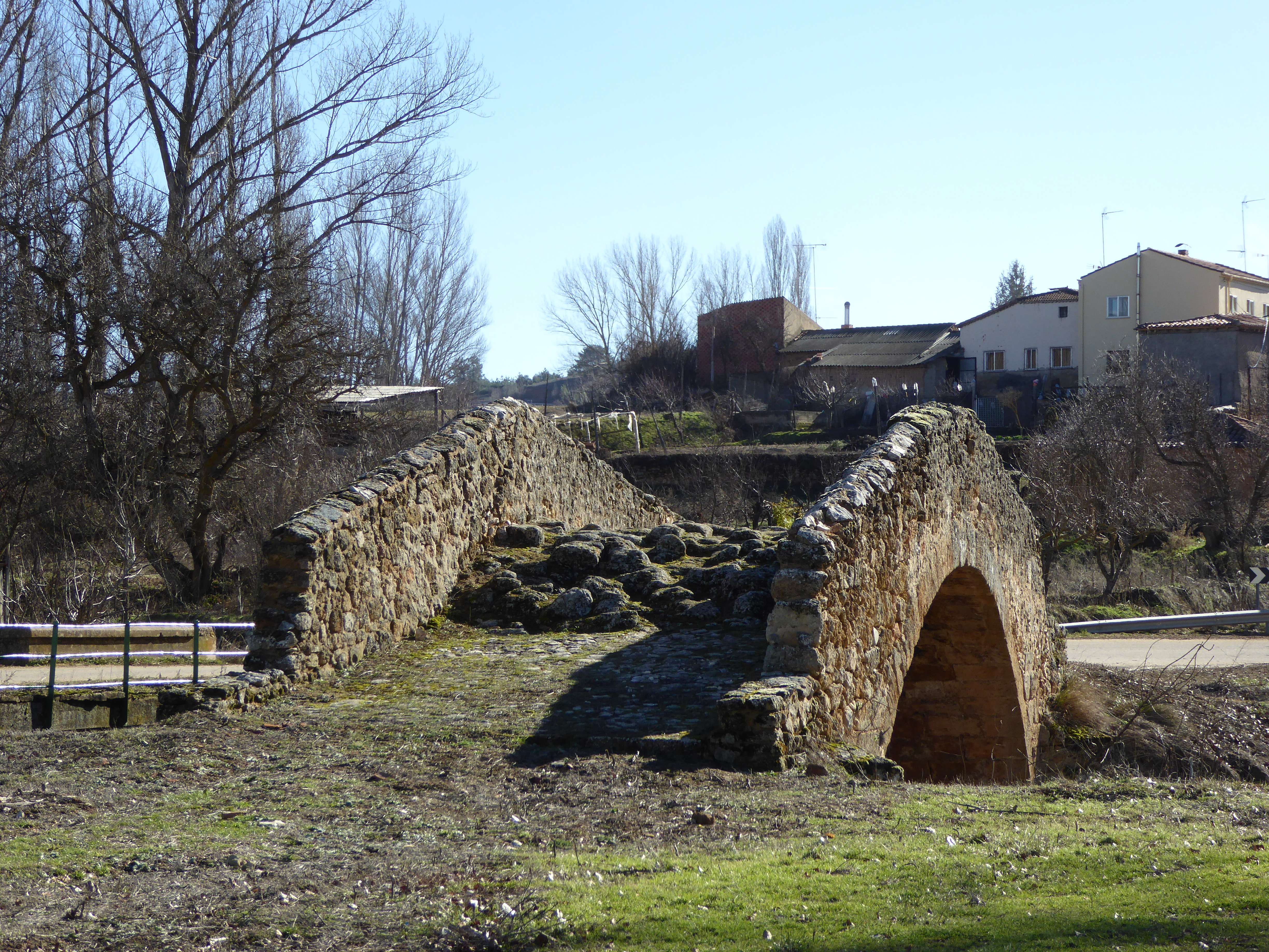 Puente románico de Fuentepinilla